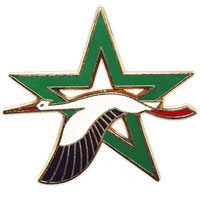 Insigne de l'Ecole de Chasse de Meknès « Christian Martell », attribué en janvier 1947. Repris par extension par les bases écoles BE 708 (Meknès, janvier 1947) puis BE 705 (Tours, mai 1961).